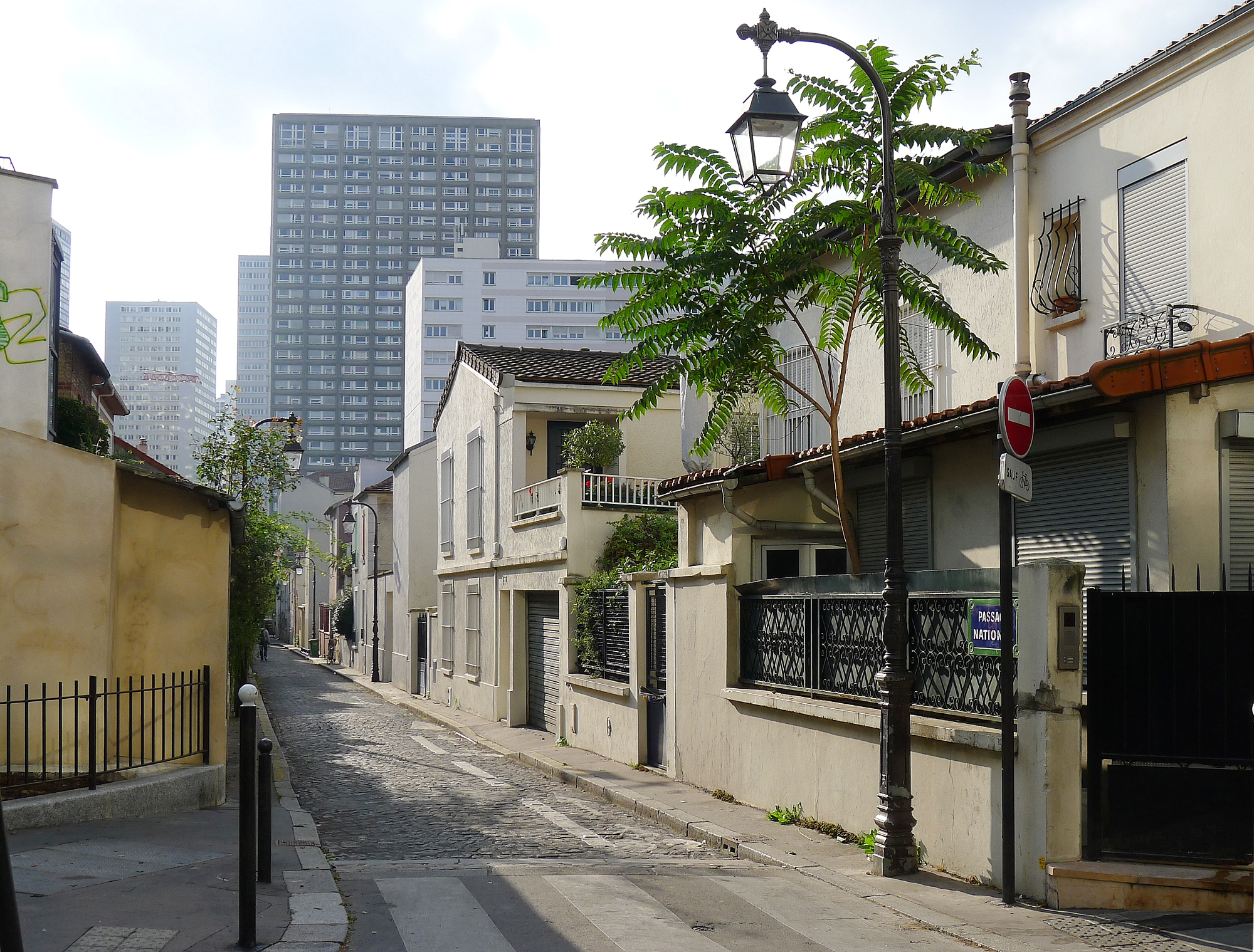 Passage national - Paris XIII